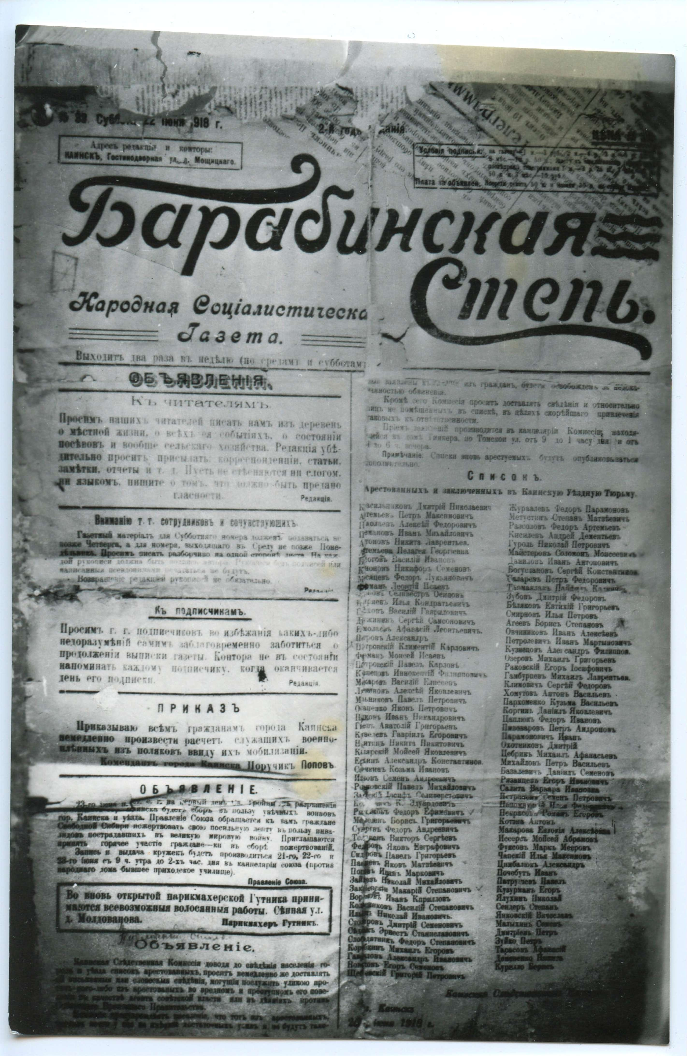 Список арестованных и заключённых в Каинскую уездную тюрьму, 1918 г. Для статьи Гаврилов, Александр Иванович